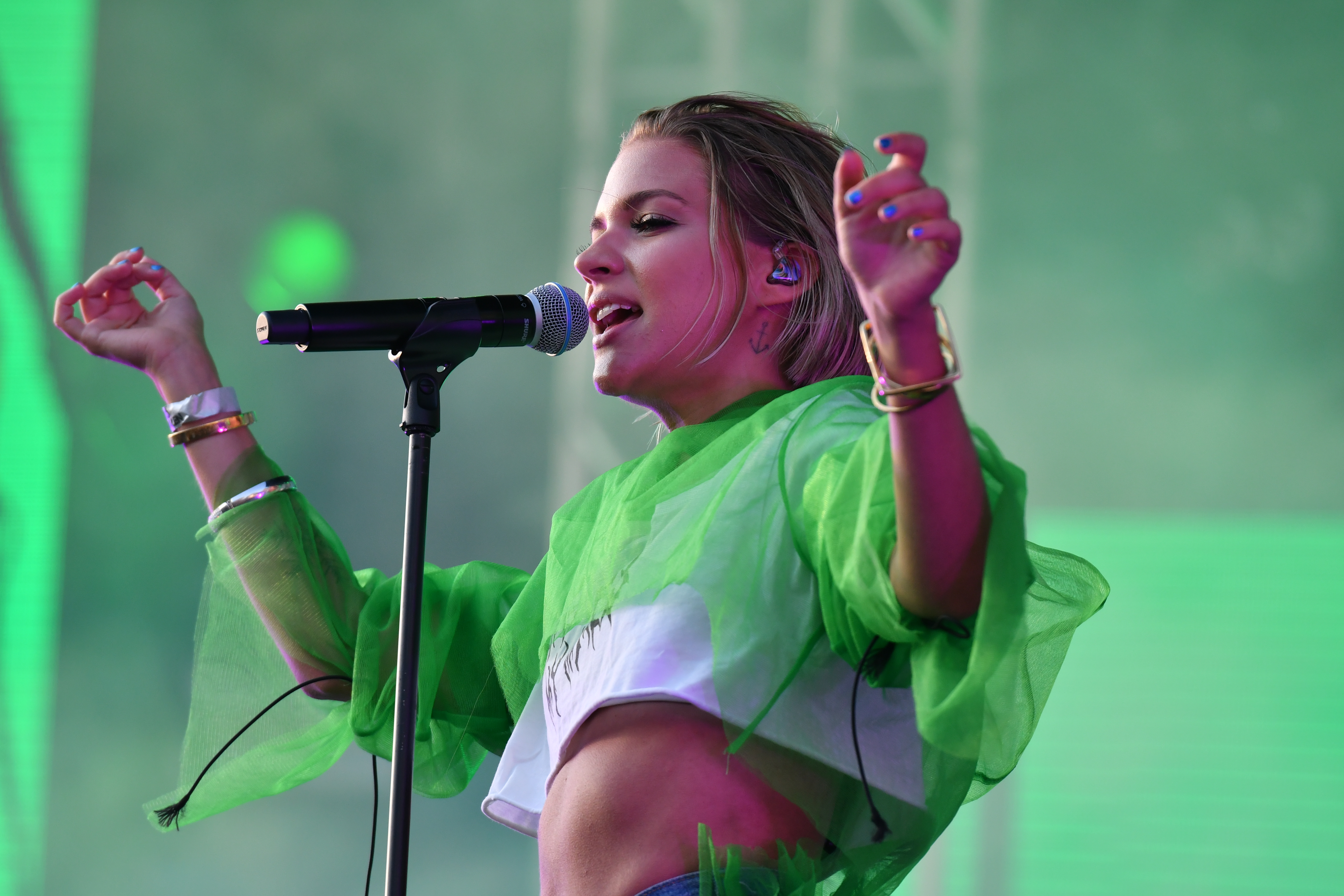 Tove Styrke på Malmöfestivalen 2018.